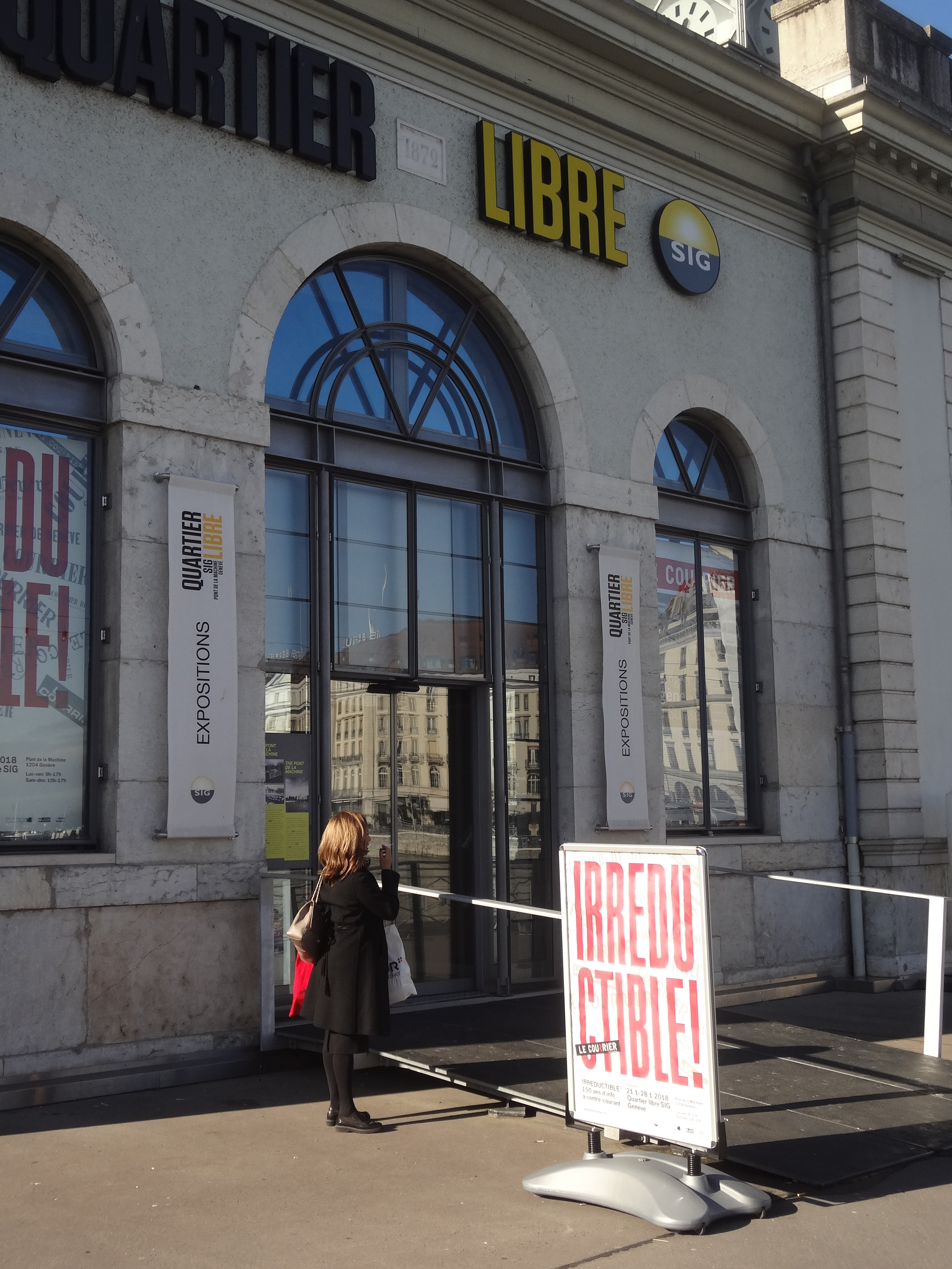 "Irréductible ! ". Exposition du journal Le Courrier pour ses 150 ans, du 21 au 28 janvier 2018, à l'arcade « Quartier libre » des SIG sur le pont de la Machine, à Genève.